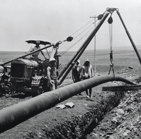 הנחת צינור הנפט עירק-חיפה